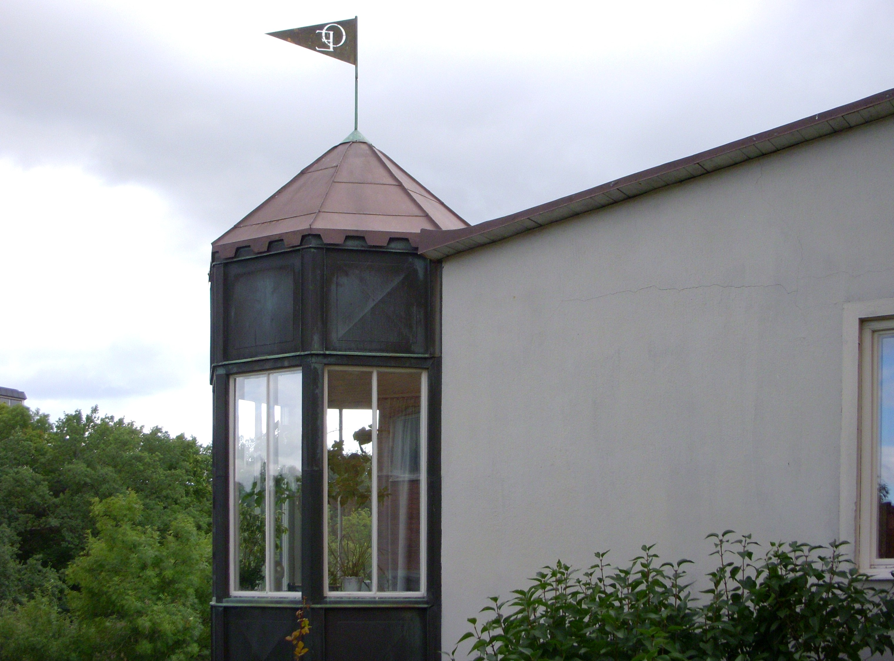 Terrasshusen Gröndal, burspråket på hörnet med Olle Engkvists initialer "OE"